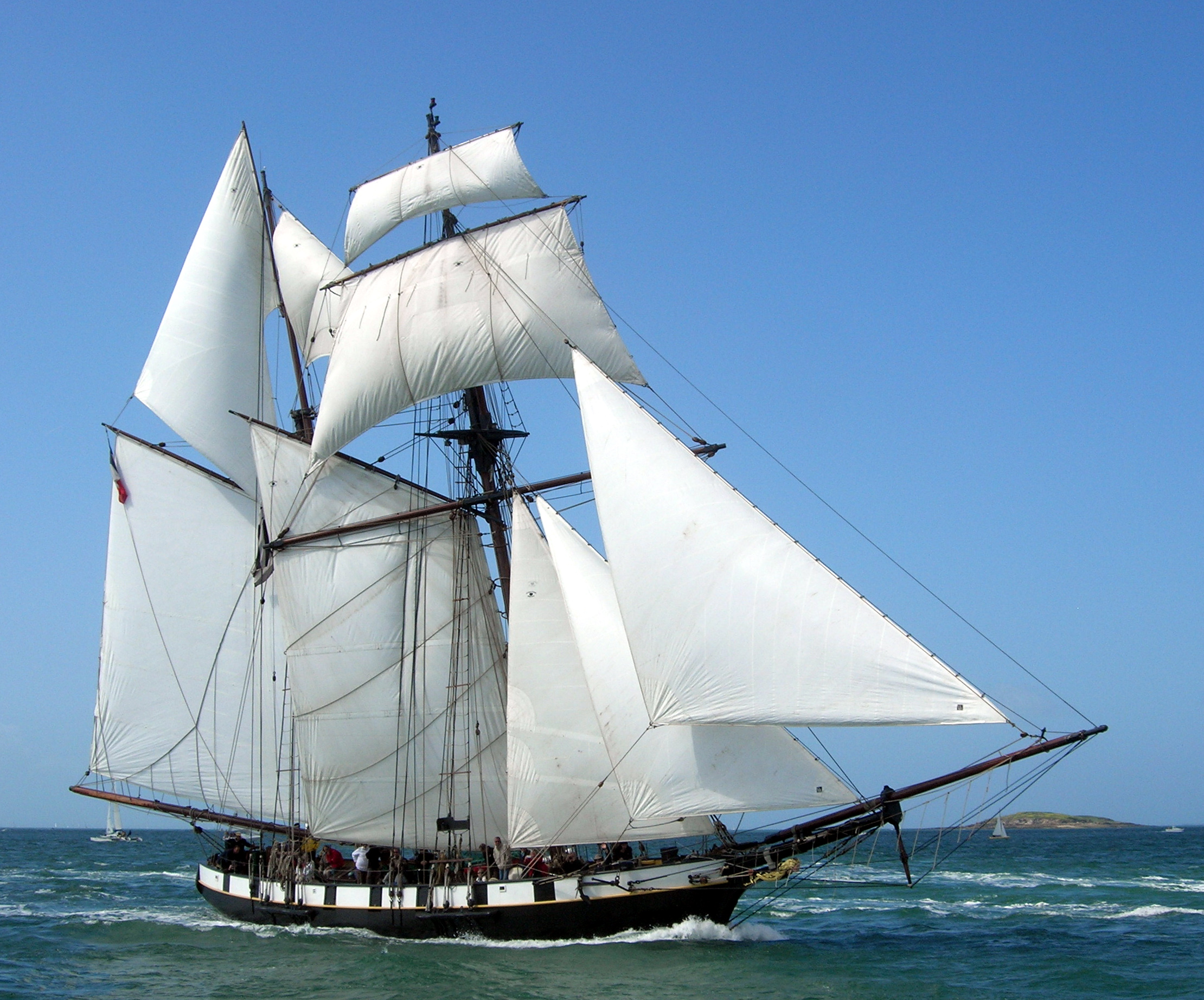 La Recouvrance durant la Semaine du Golfe du Morbihan